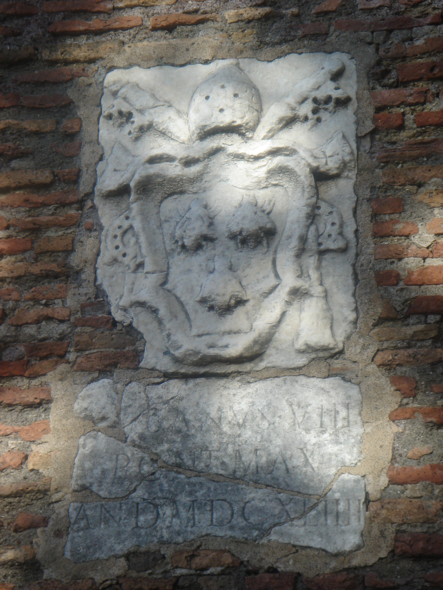 Roma, stemma di Urbano VIII sulle mura gianicolensi presso Porta Portese (1644)